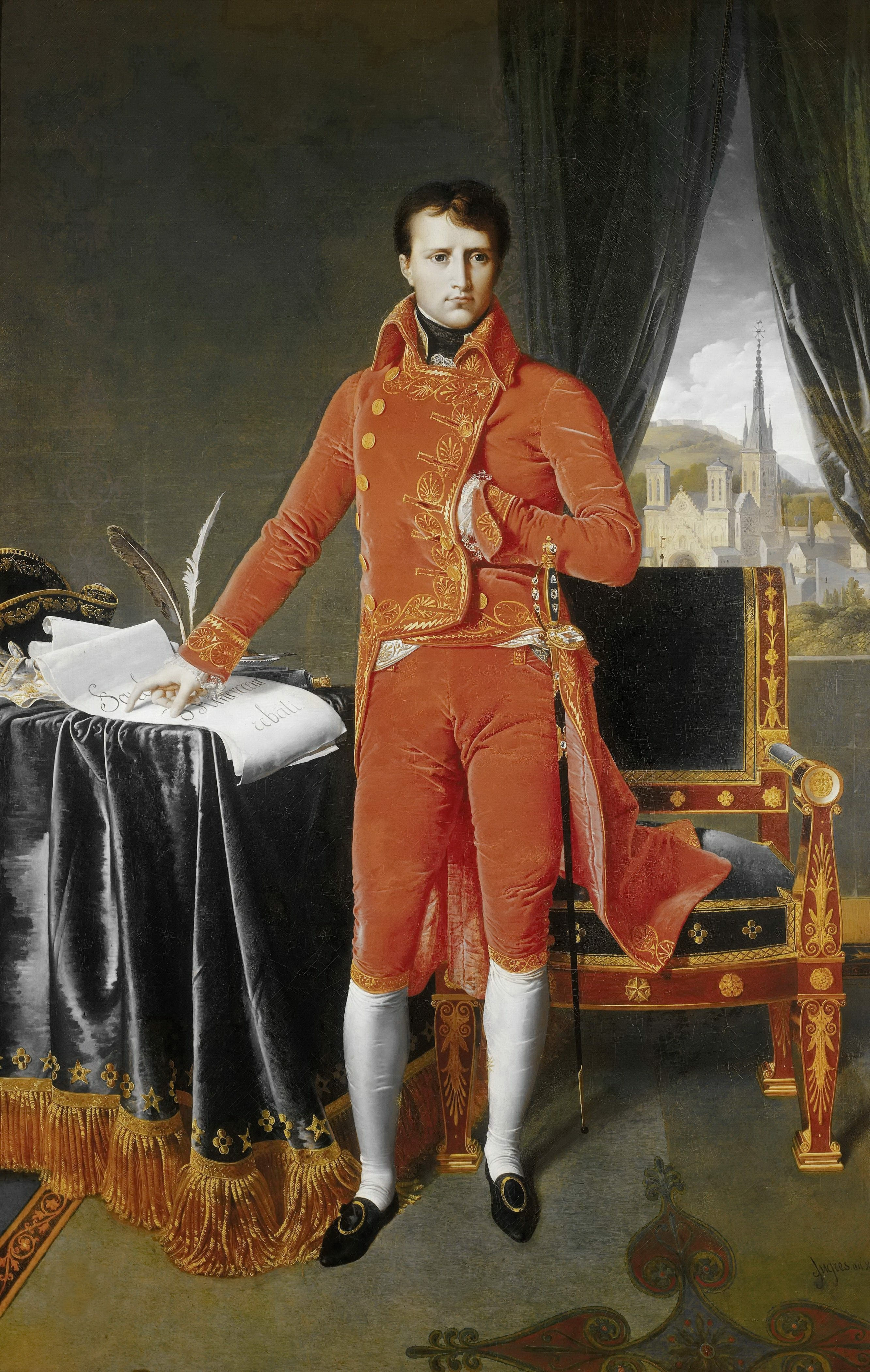 Porträt Napoleon Bonapartes als Erster Konsul